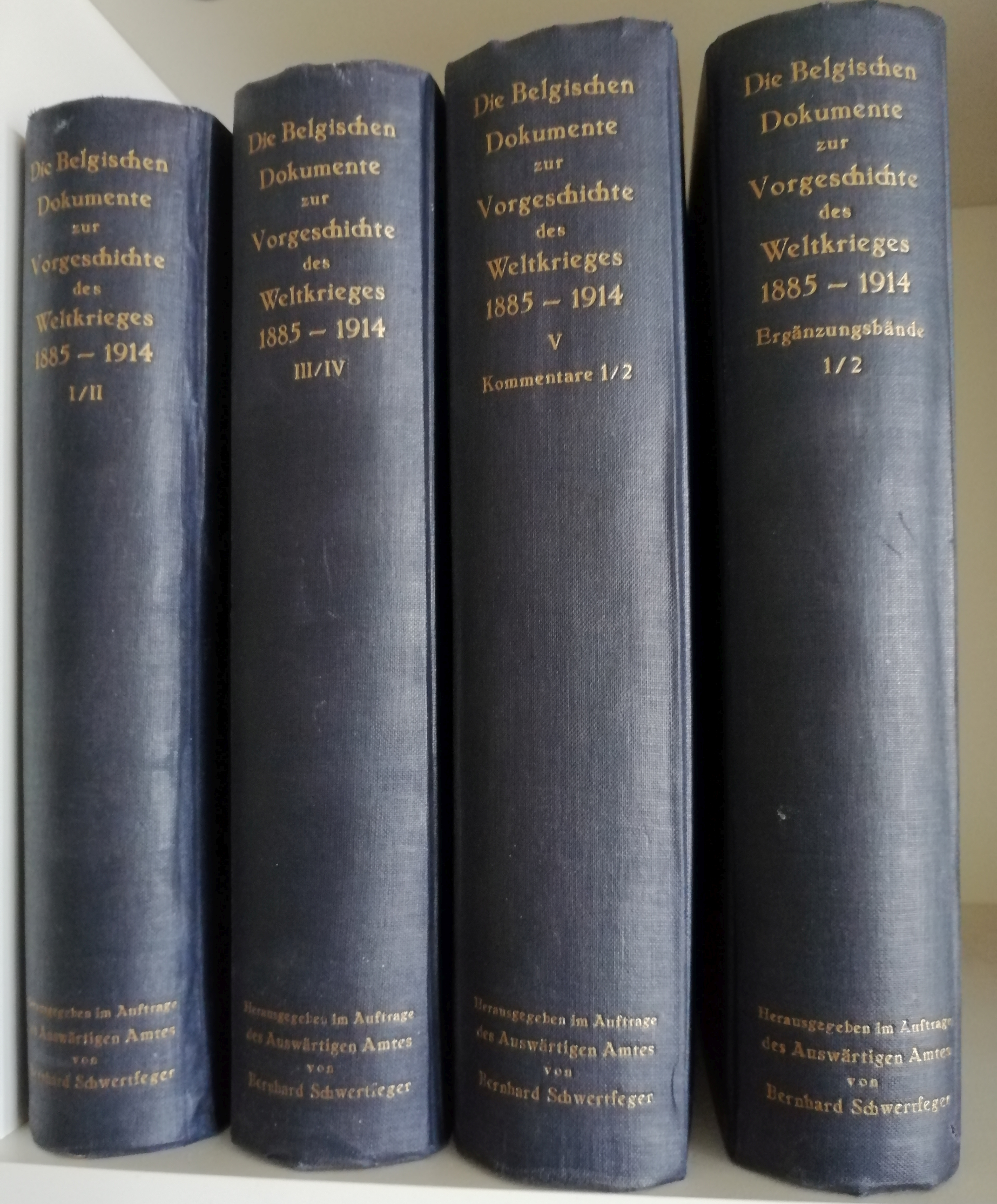 Die Belgischen Dokumente zur Vorgeschichte des Weltkrieges 1885-1914, Zweite Auflage 1925, Buchrücken im Regal